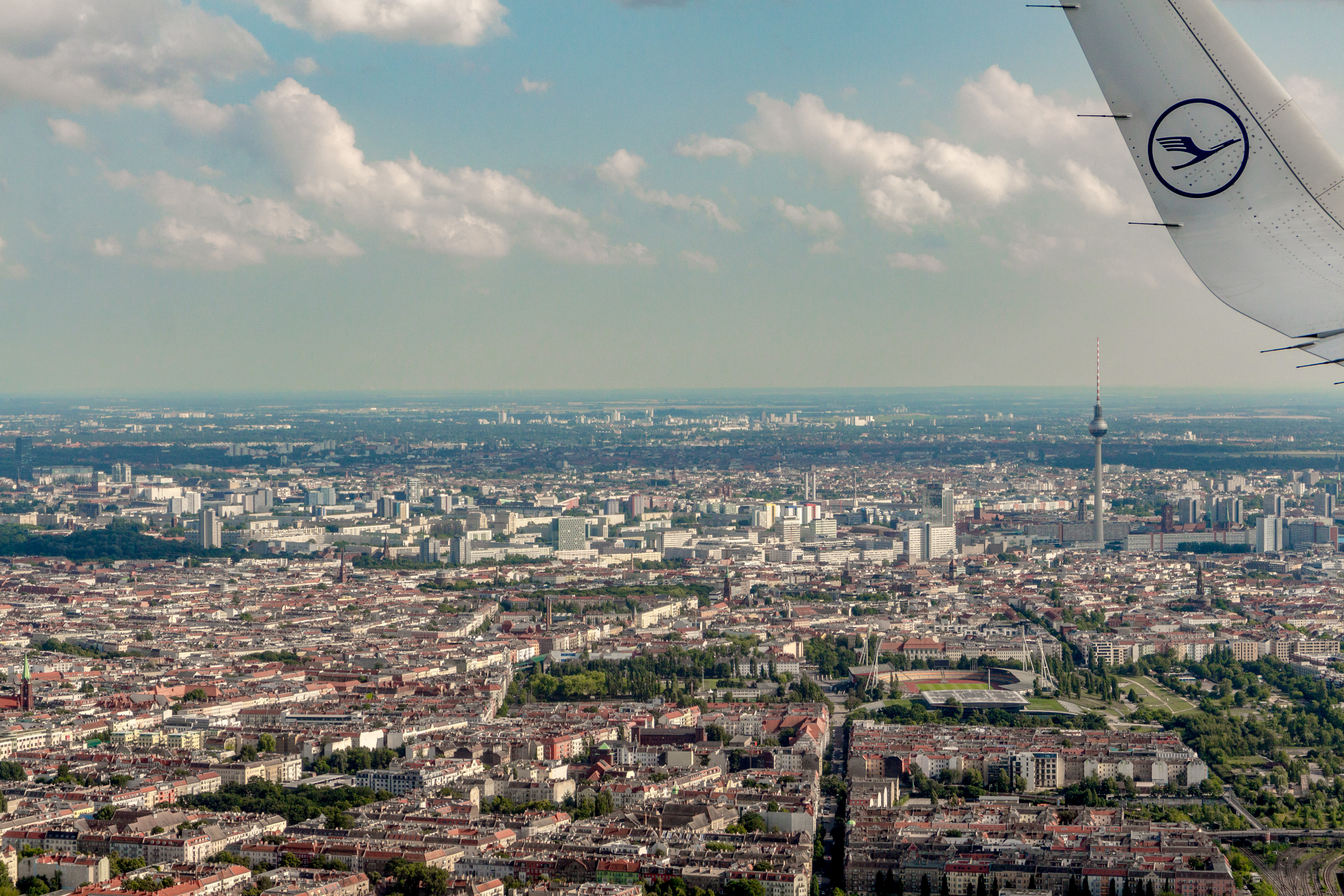 Mauerpark, Fernsehturm, Rotes Rathaus, Allianz-Tower, Forum-Hotel, U-Bhf- Eberswalder Str. uvm